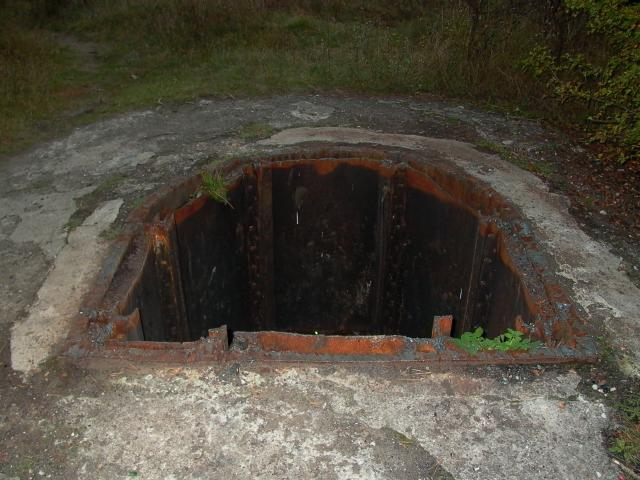 Fotografia przedstawia miejsce po zniszczonej kopulce obserwacyjnej Fortu VII Twierdzy Modlin. Autor: Zbigniew Strucki